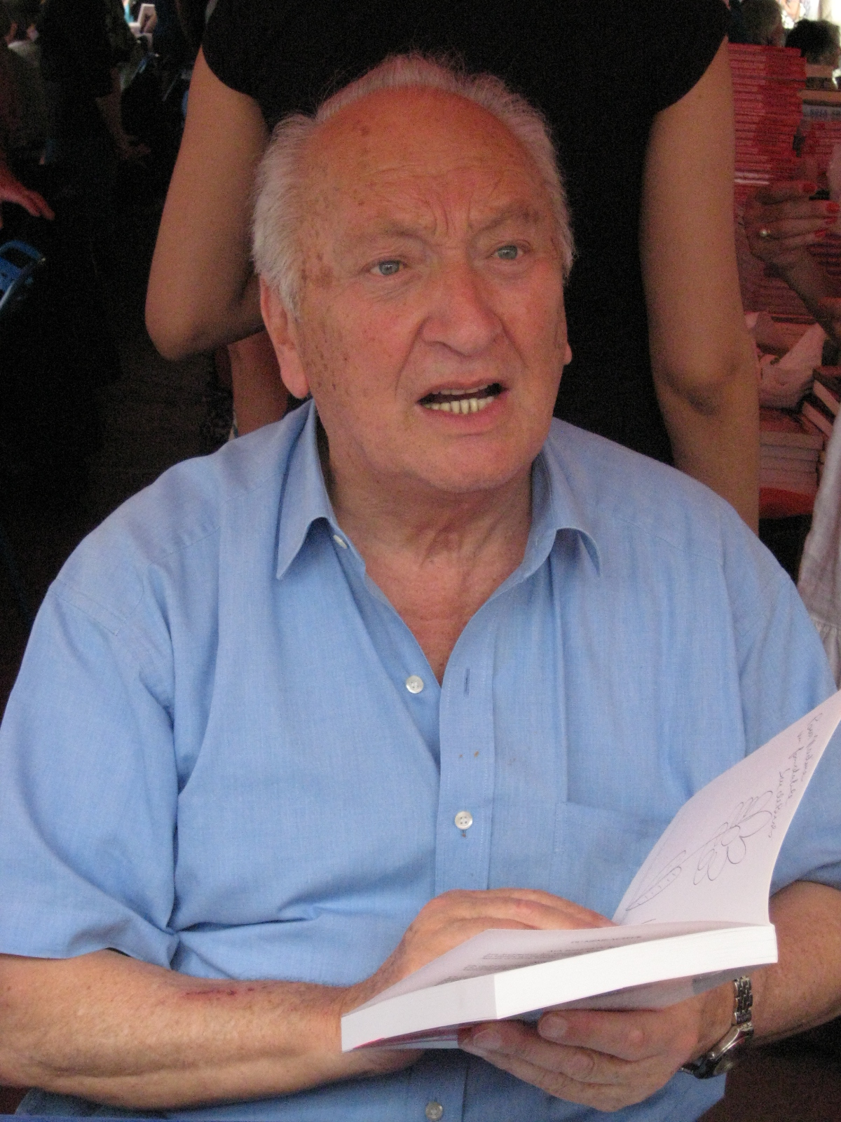 Joseph Joffo en séance de dédicace à "La Comédie du livre" de Montpellier, 23 mai 2009